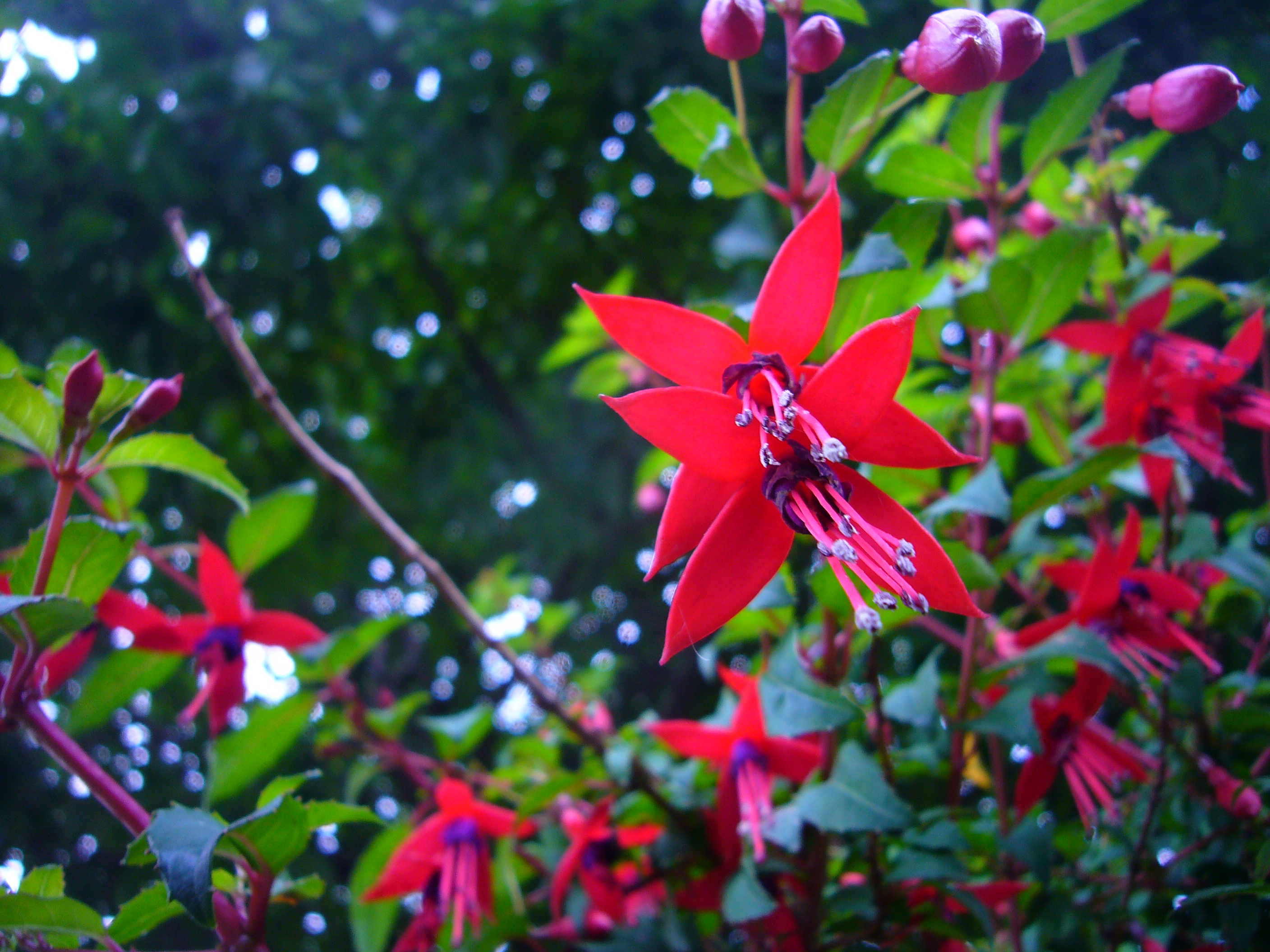 Fuchsia